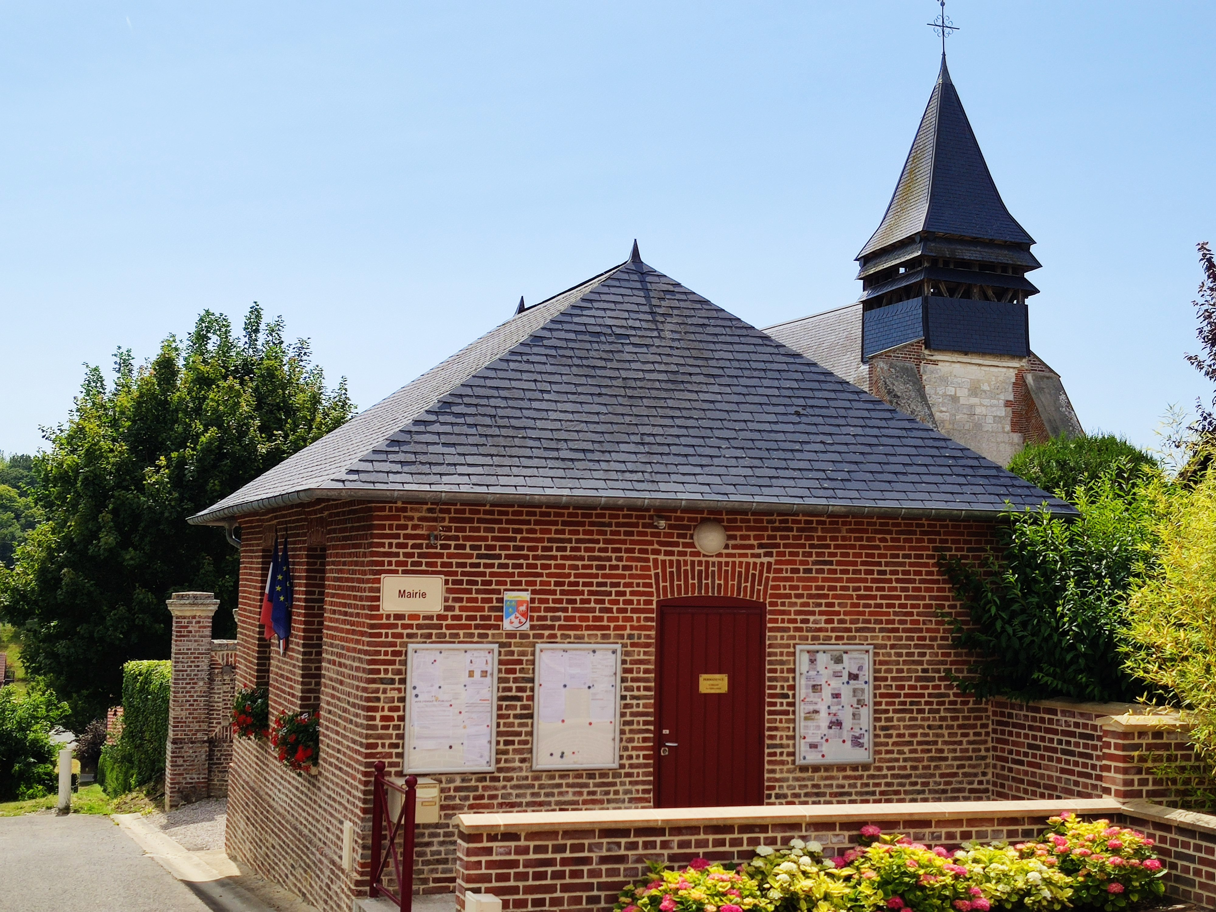 Courcelles-sous-Moyencourt : La mairie et le clocher de l'église saint-Jean-Baptiste